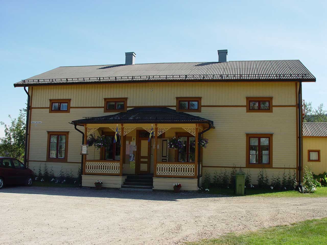 Arvidsjaur Hembygdsmuseet Gamla Prestgården